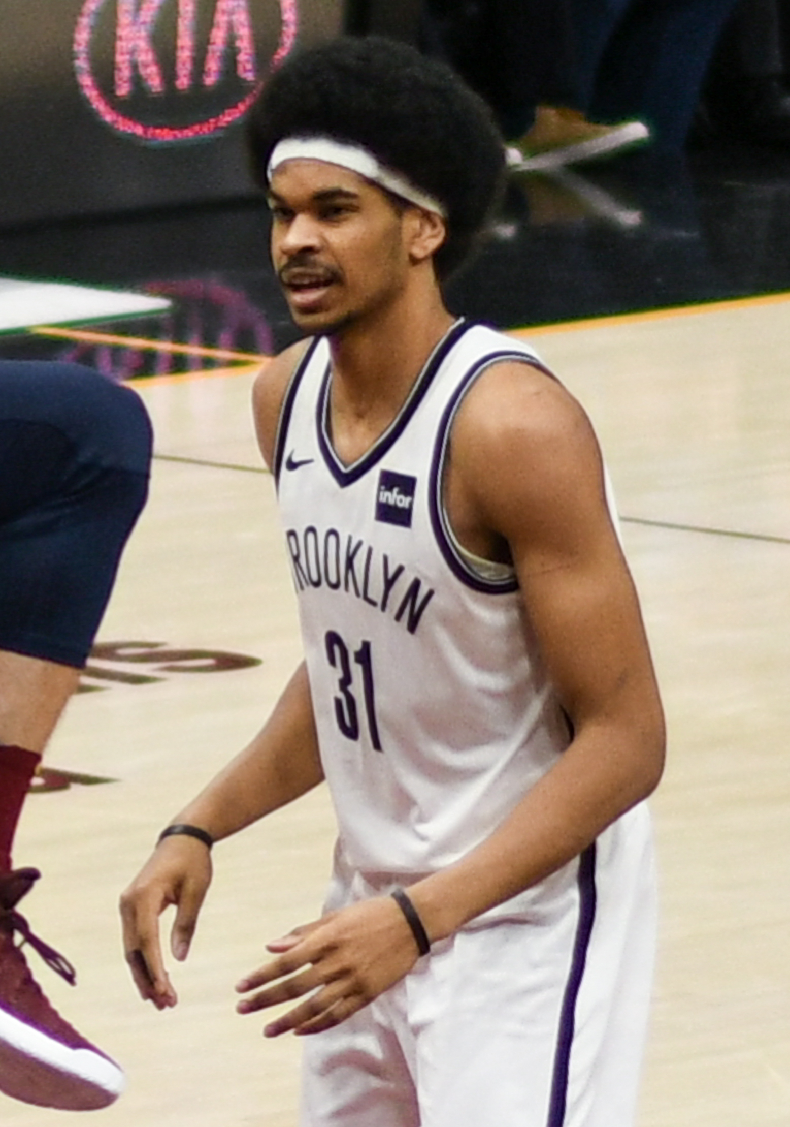 Jarrett Allen